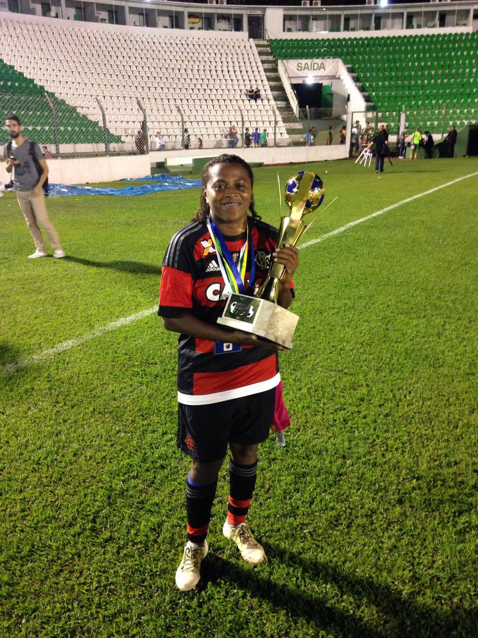 No gramado do estádio Anísio Haddad, em São José do Rio Preto (SP), Maycon posa com o troféu do campeonato brasileiro de 2016.